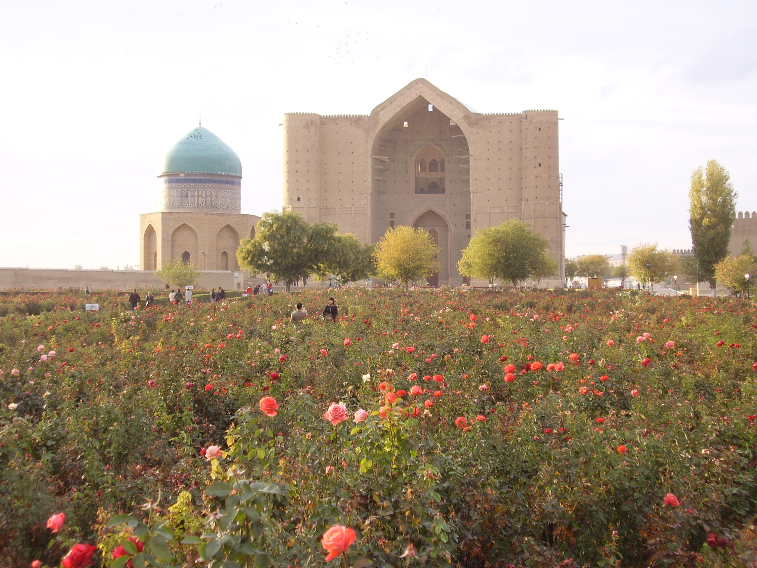 В центре — ханака Ахмеда Ясави, слева — мавзолей Рабиги Султан Бегим, справа видна стена цитадели. Город Туркестан, Казахстан.